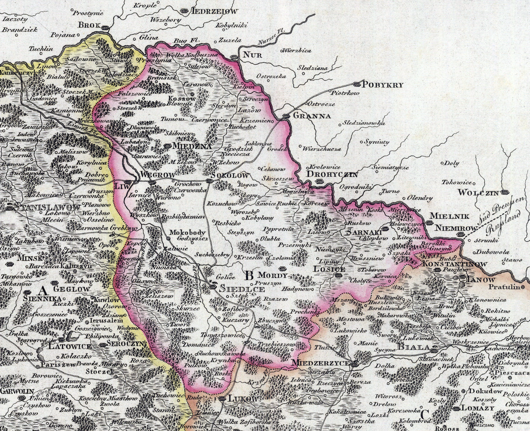 Fragment File:Nowa Galicja Mapa - Wiązowna-Siedlce-Biała-Chełm-Lublin 1803.jpg - Cyrkuł siedlecki w granicach z początku 1803 r. (po likwidacji cyrkułu łukowskiego w 1802, a przed połączeniem z cyrkułem wiązowieńskim w maju 1803).